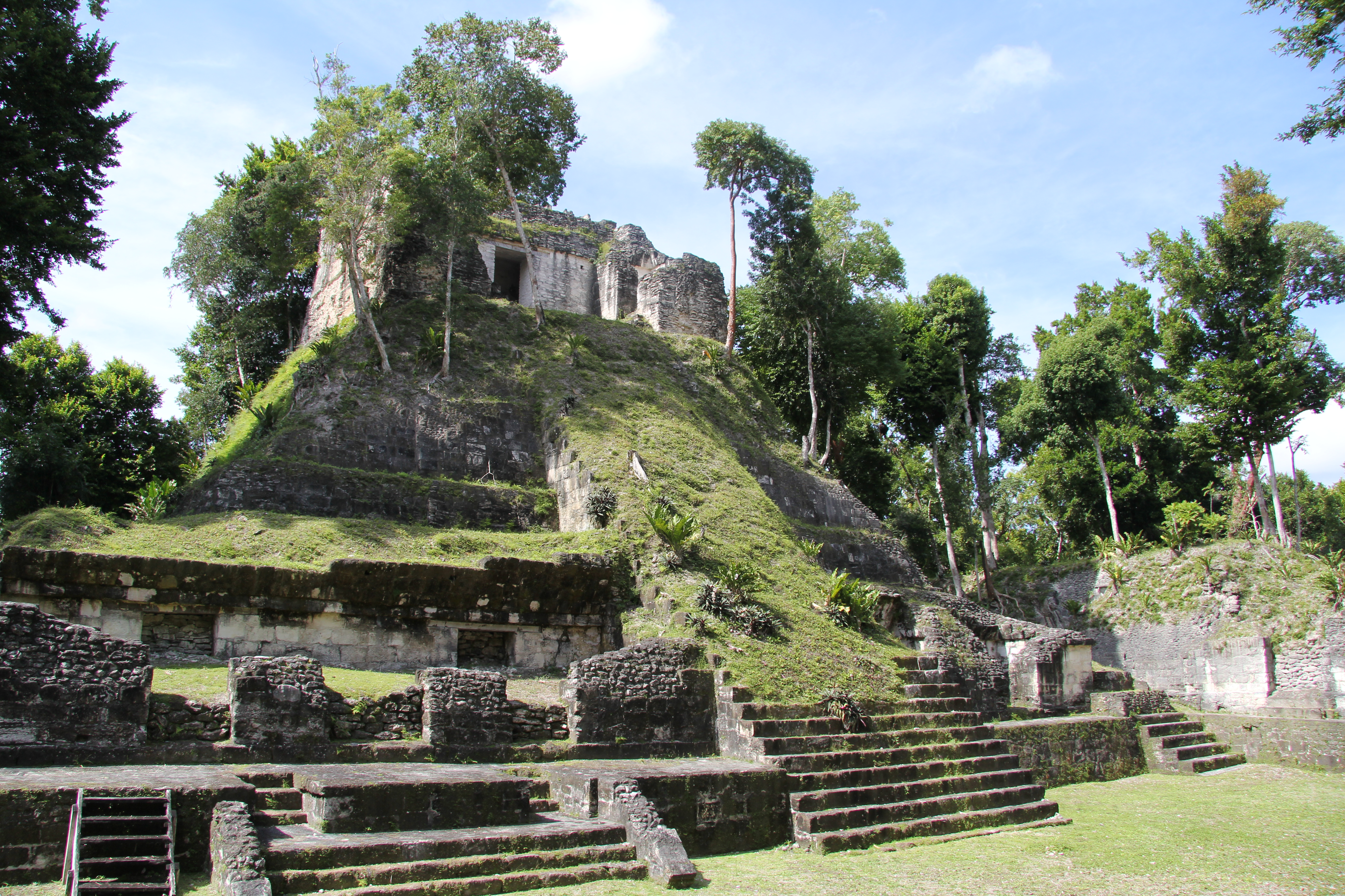 Templo en Nakum, Parque Yaxhá Nakum Naranjo, Reserva de la Biosfera Maya, Petén, Guatemala